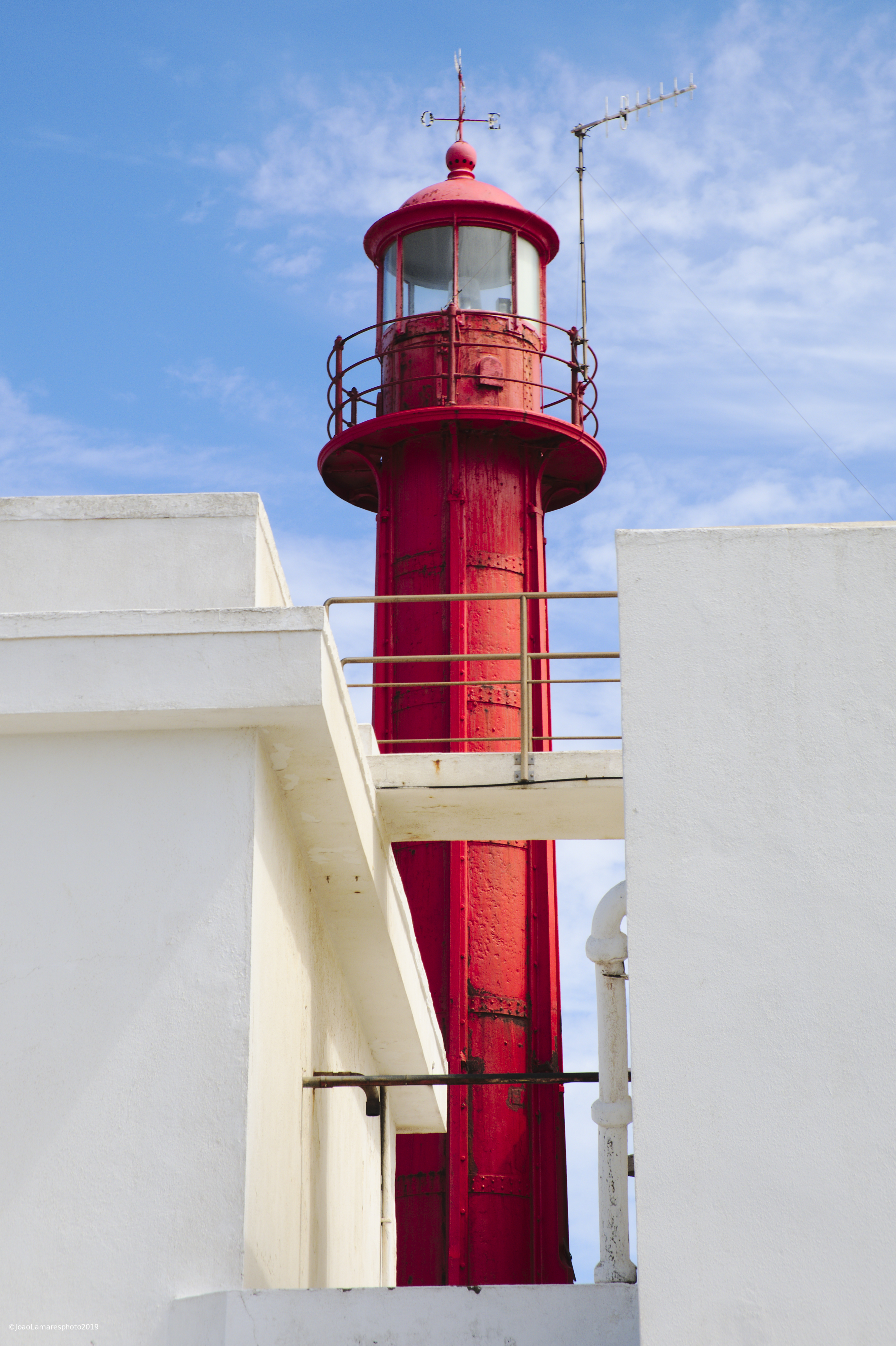 Cabo Raso, Light House, Cascais. This is a photography of a protected area of Portugal indexed in the World Database on Protected Areas with the ID: 555623260 (WDPA)